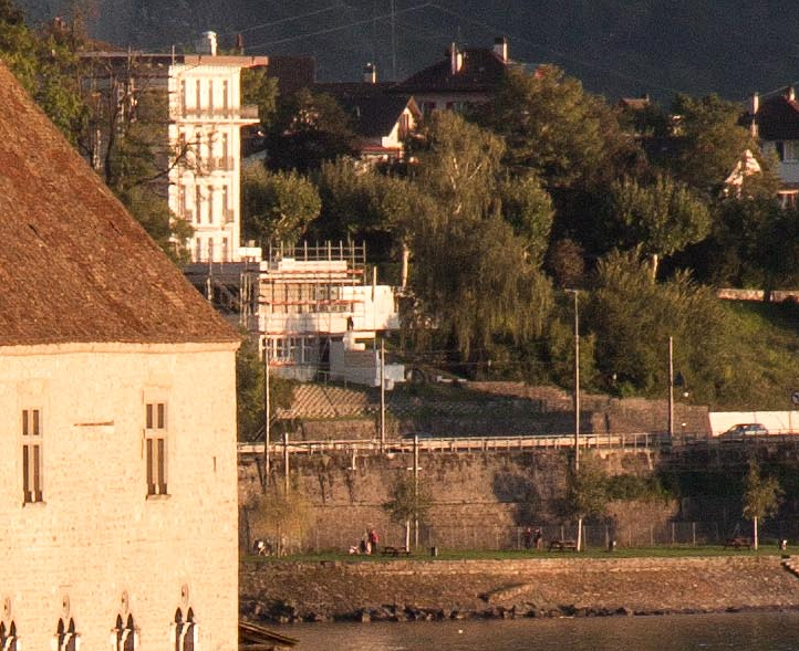 Dépendance avec salles de bain, construit en 1912, de l'Hôtel de Byron (1841-1933) à Villeneuve, seul bâtiment encore debout aujourd'hui, et château de Chillon à Veytaux.